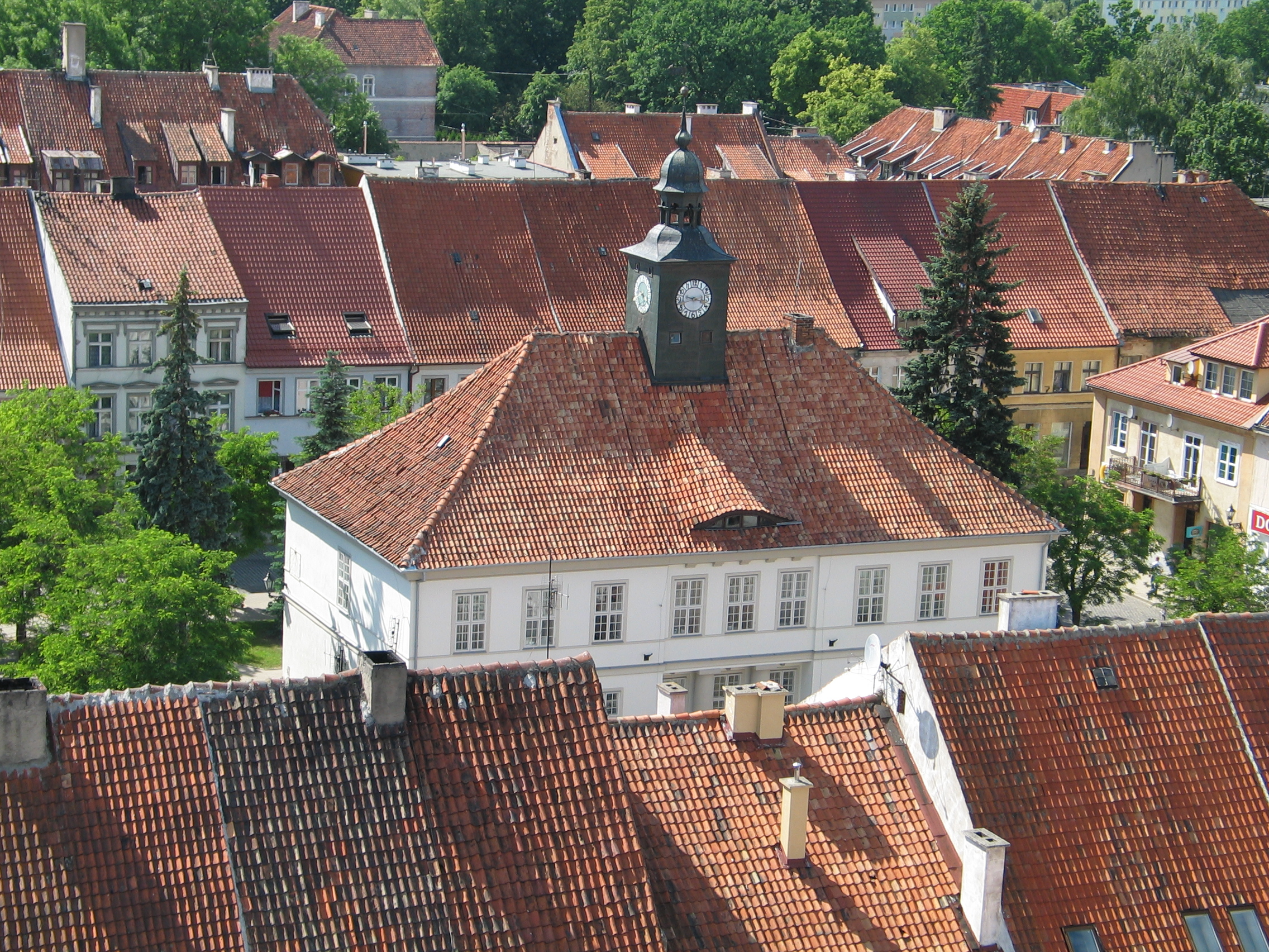 Widok z wieży na Ratusz w Reszlu